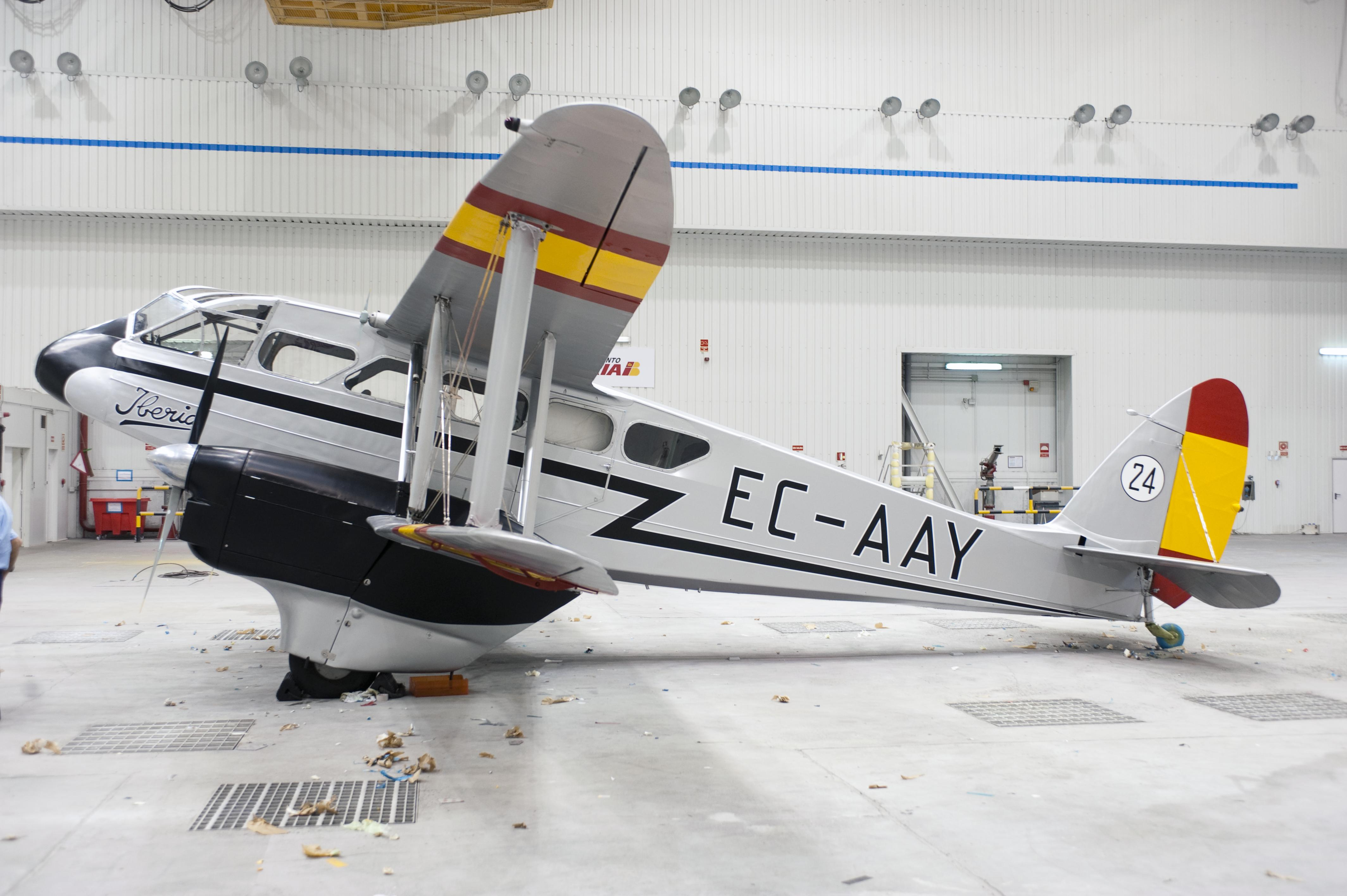 una vez terminados los trabajos de pintura en La Muñoza (hangar 7) con los colores e imagen de Iberia de los años 30